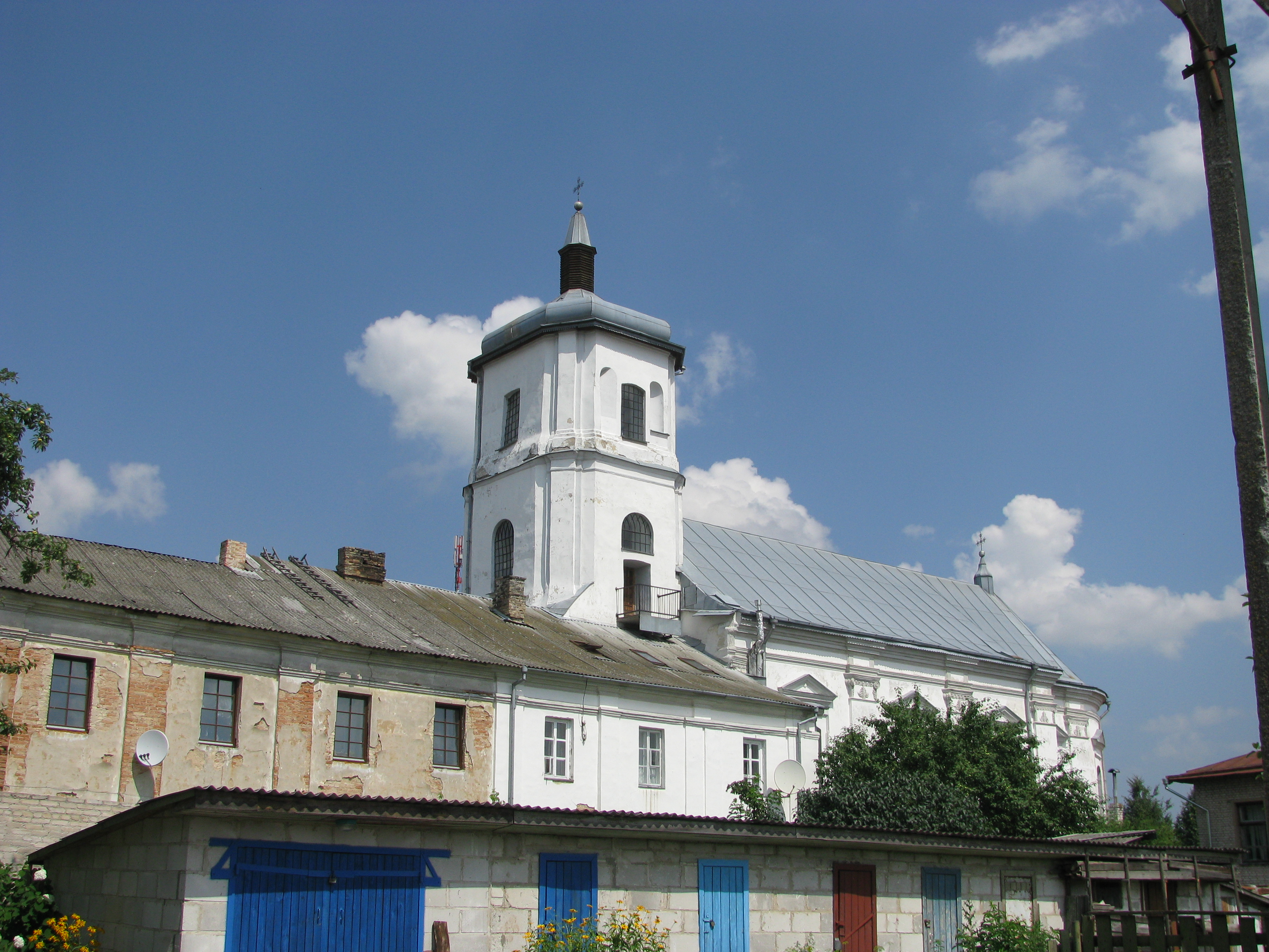 Беларуская (тарашкевіца): Комплекс былога кляштару бэрнардынак:касьцёл Марыі.Дэкаратыўнае аздабленьне: пяць алтароў, амбон, арнамэнтальная разьба,арганжылы корпус. г. Слонім This is a photo of Belarusian heritage monument. Reference number: 412Г000505 ( WLM)